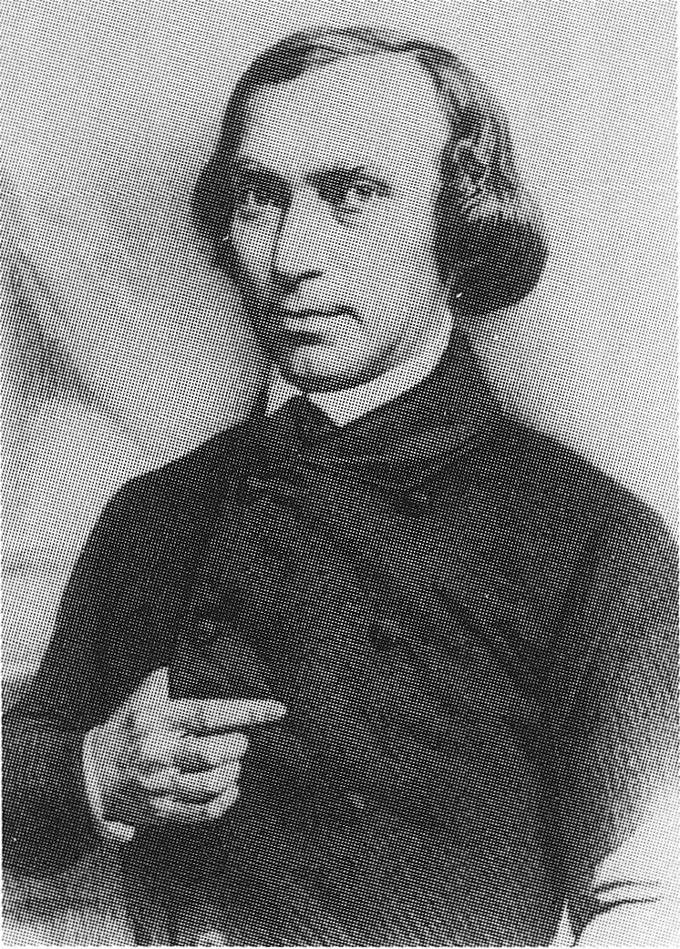 Portrait des Rabbiners und Schriftstellers Leopold Stein